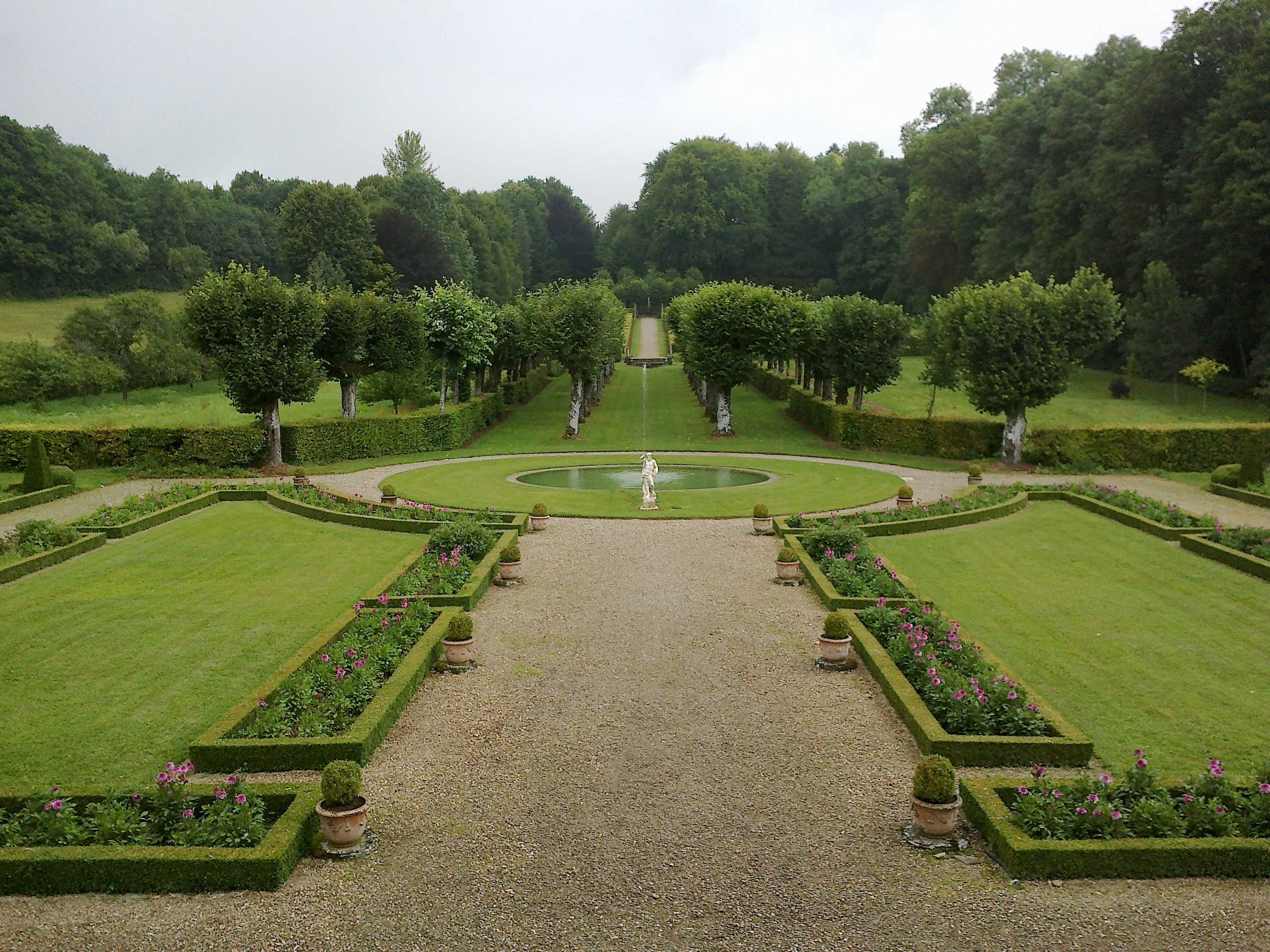 Jardin de Silière et sa demeure, 5 rue Varinot, 52600 Cohons (Inscrit Arrêté, 1986) .